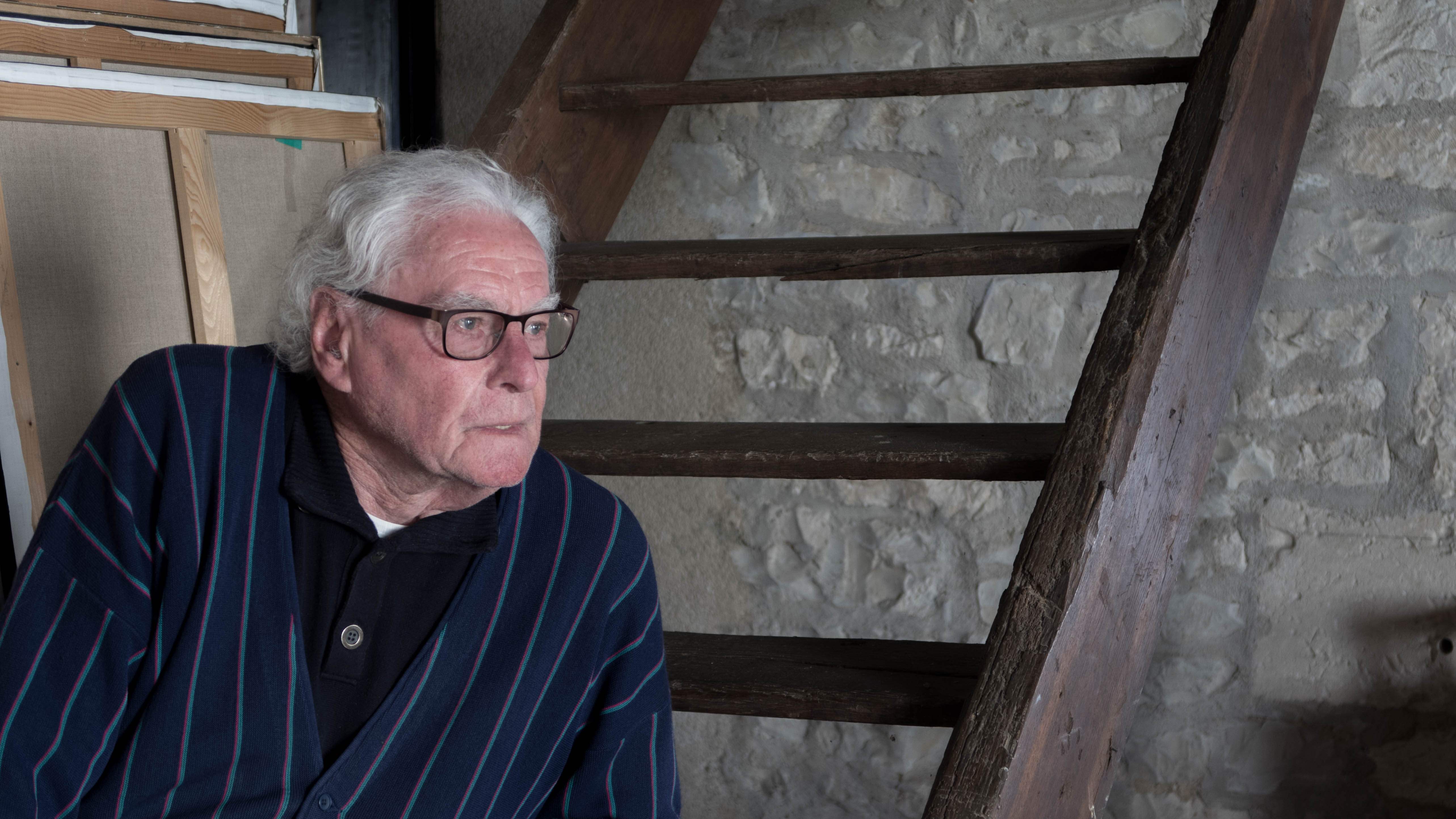 portrait